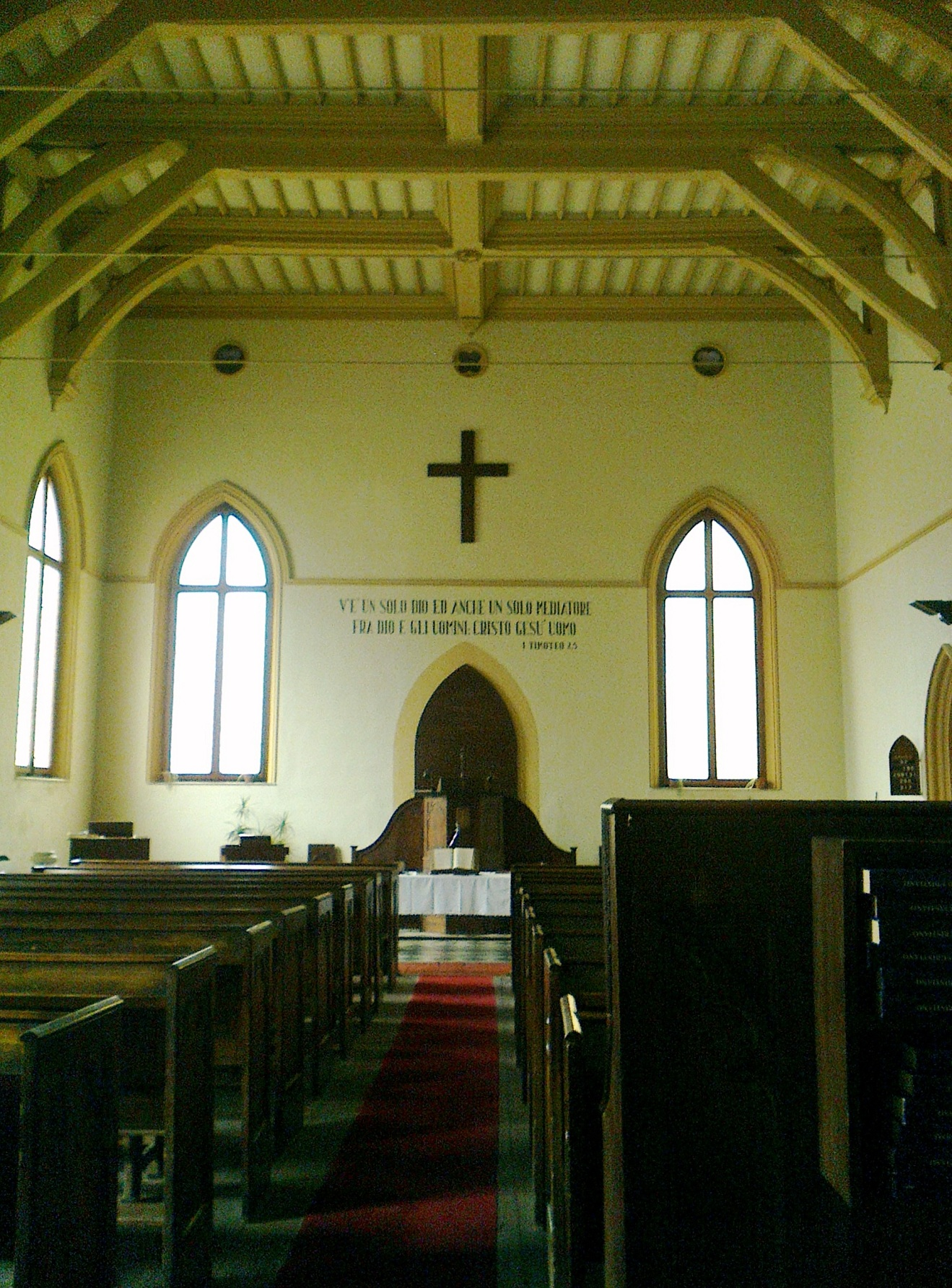 Livorno, interno della chiesa valdese, già presbiteriana scozzese, risalente alla metà dell'Ottocento.